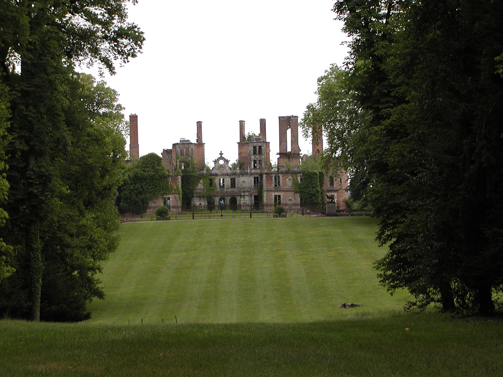 Ruines du château de Randan et parc, France